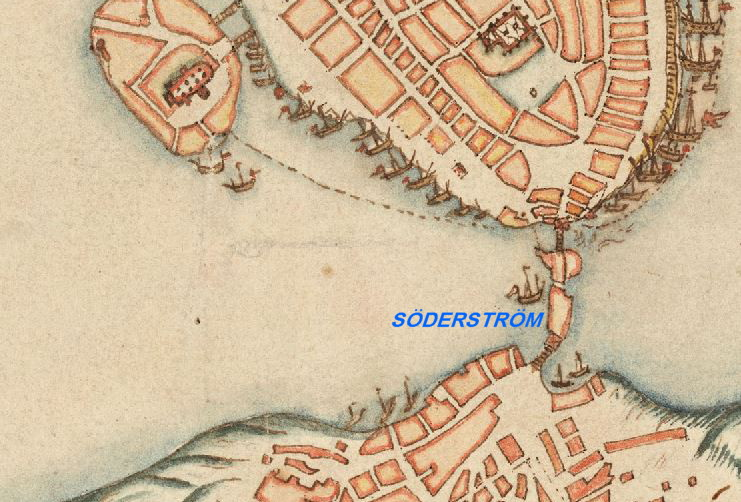 Del av Stockholmskarta från 1642 med Söderström